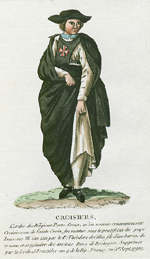 Collection de costumes de tous les ordres monastiques, supprimés à differentes époques, dans la ci-devant Belgique, Bruxelles, Philippe Joseph Maillart et sœur, 1811